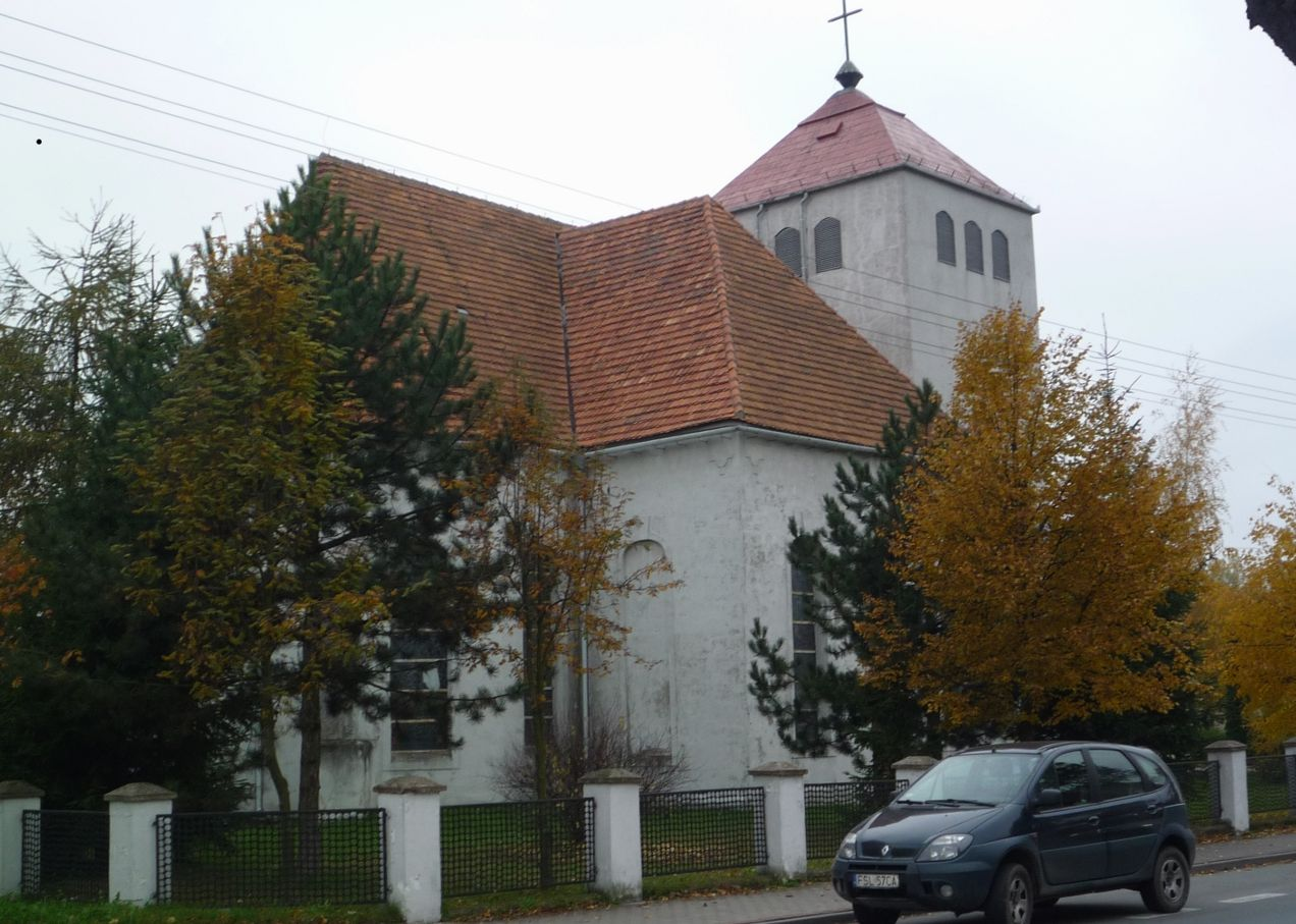 Górzyca – dawny kościół ewangelicki, obecnie rzym.-kat. par. pw. Matki Łaski Bożej z (XV), XVIII w.